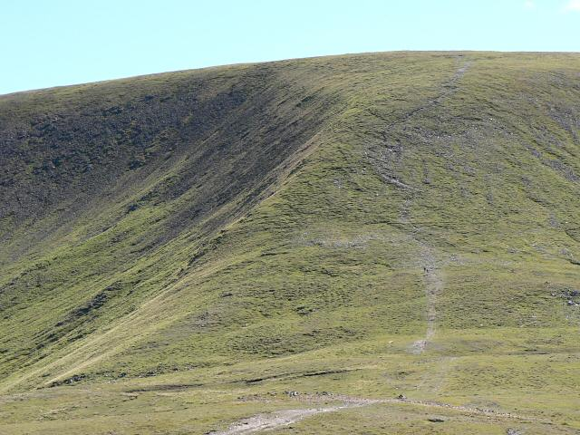 Glas Maol